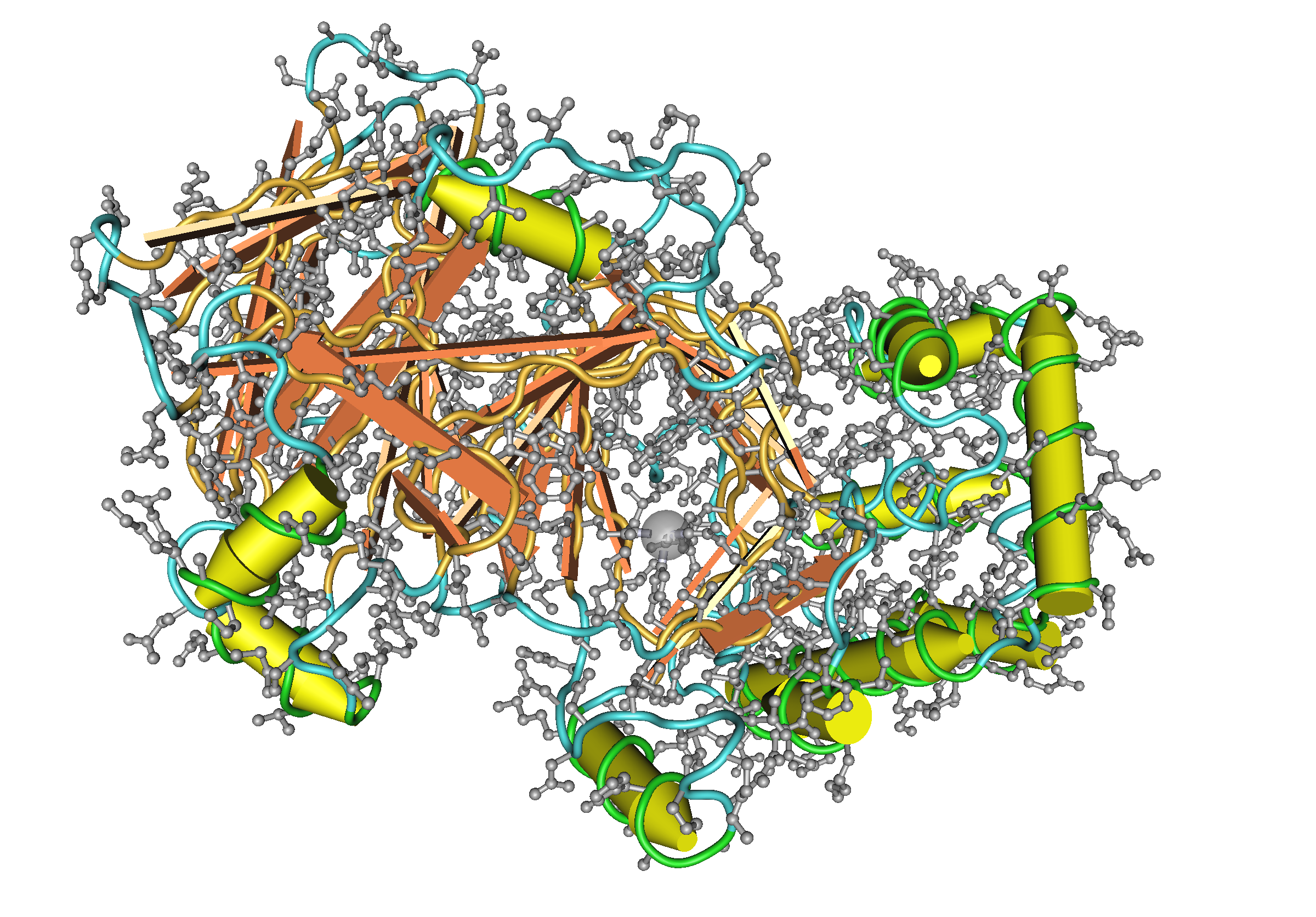 1PMI human rantes